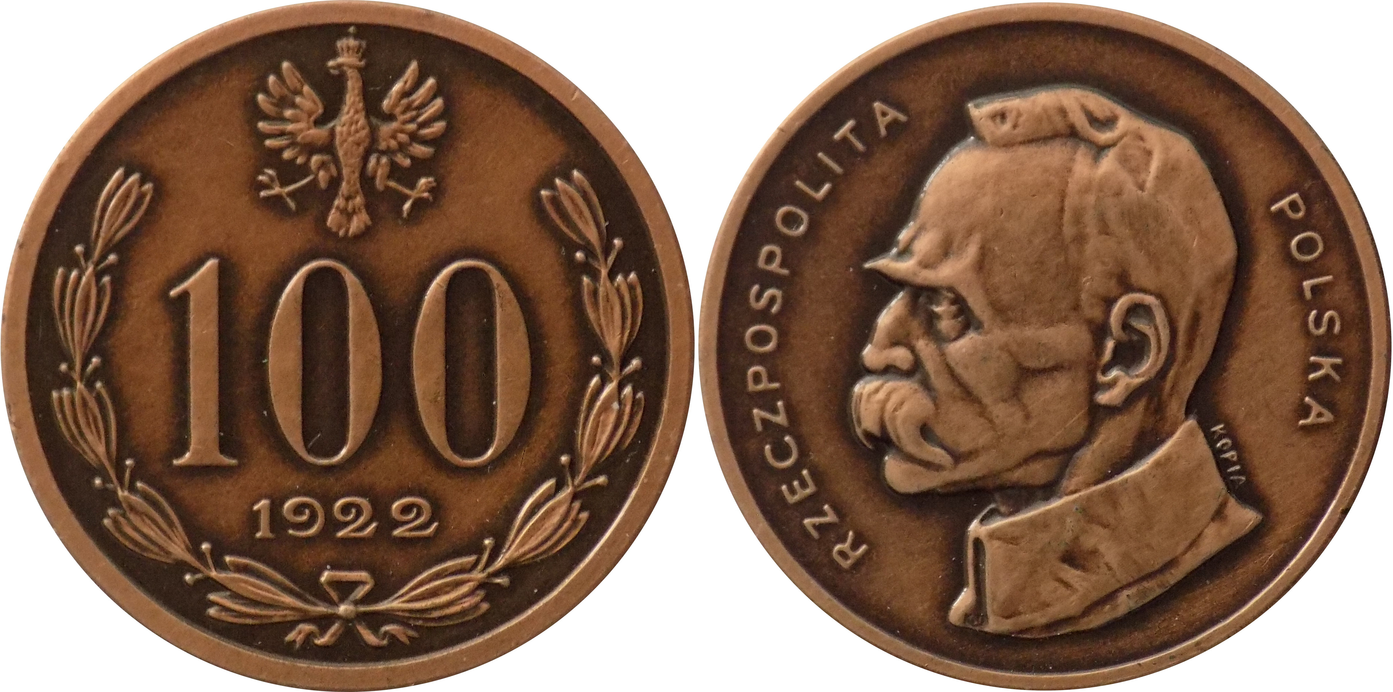 Replika 100 marek polskich 1922 Józef Piłsudski miedź